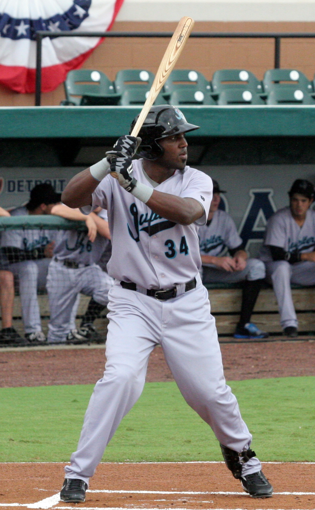 Marcell Ozuna